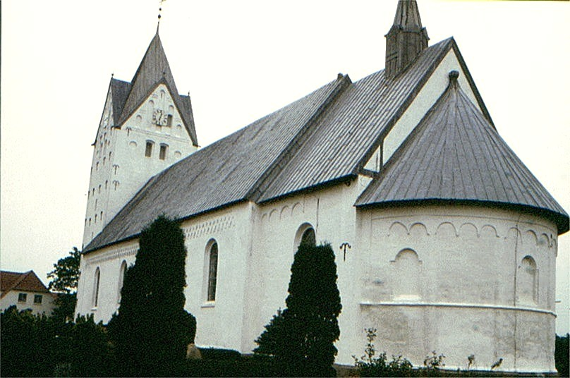 Brøns Kirke i Danmark. Brøns kirke